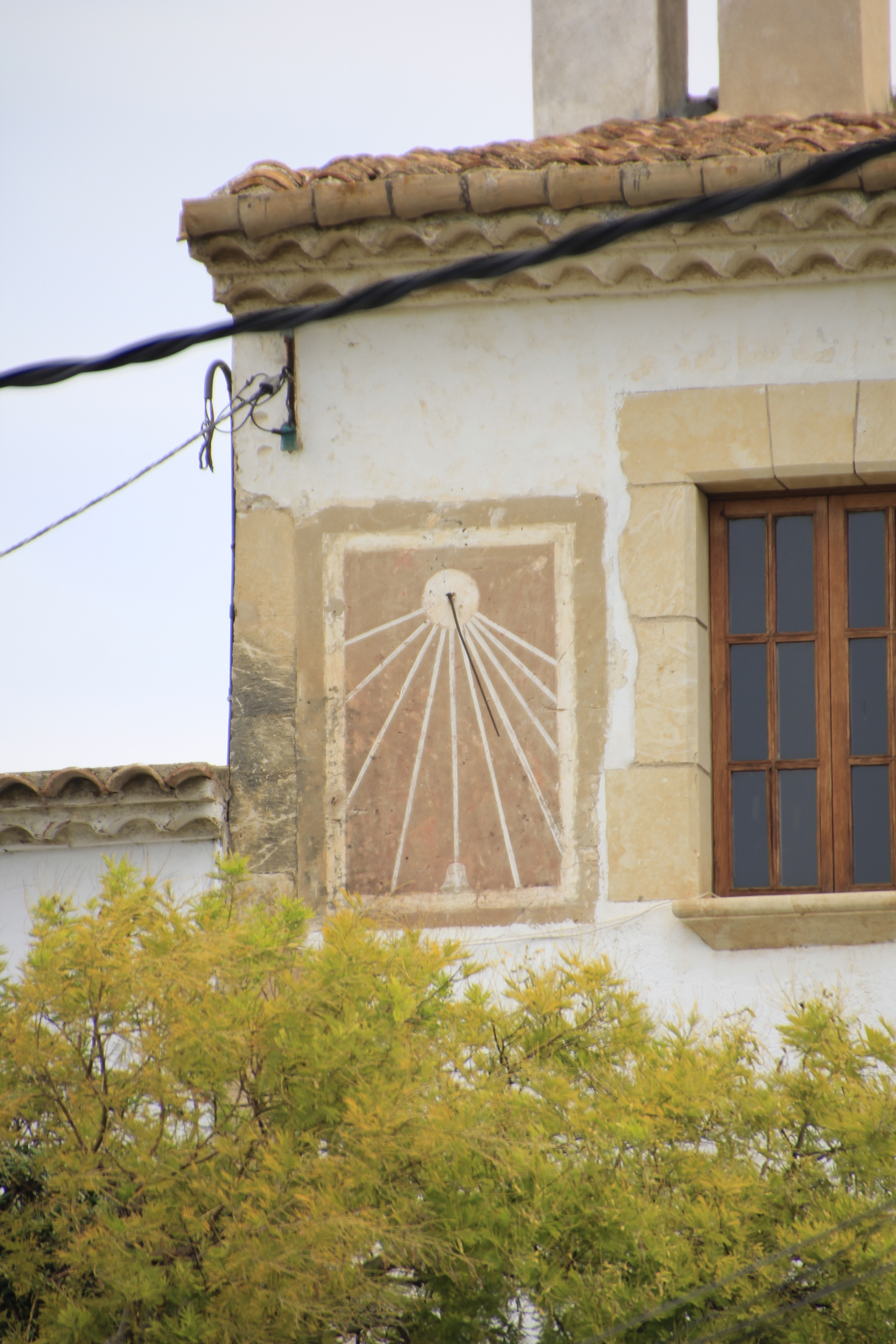 CALAFELL AIRE 3 MG 8148